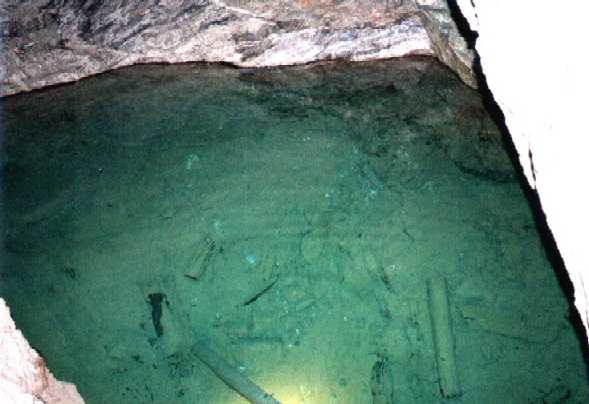 Schaubergwerk Arzberg - Wassergefülltes Gesenk